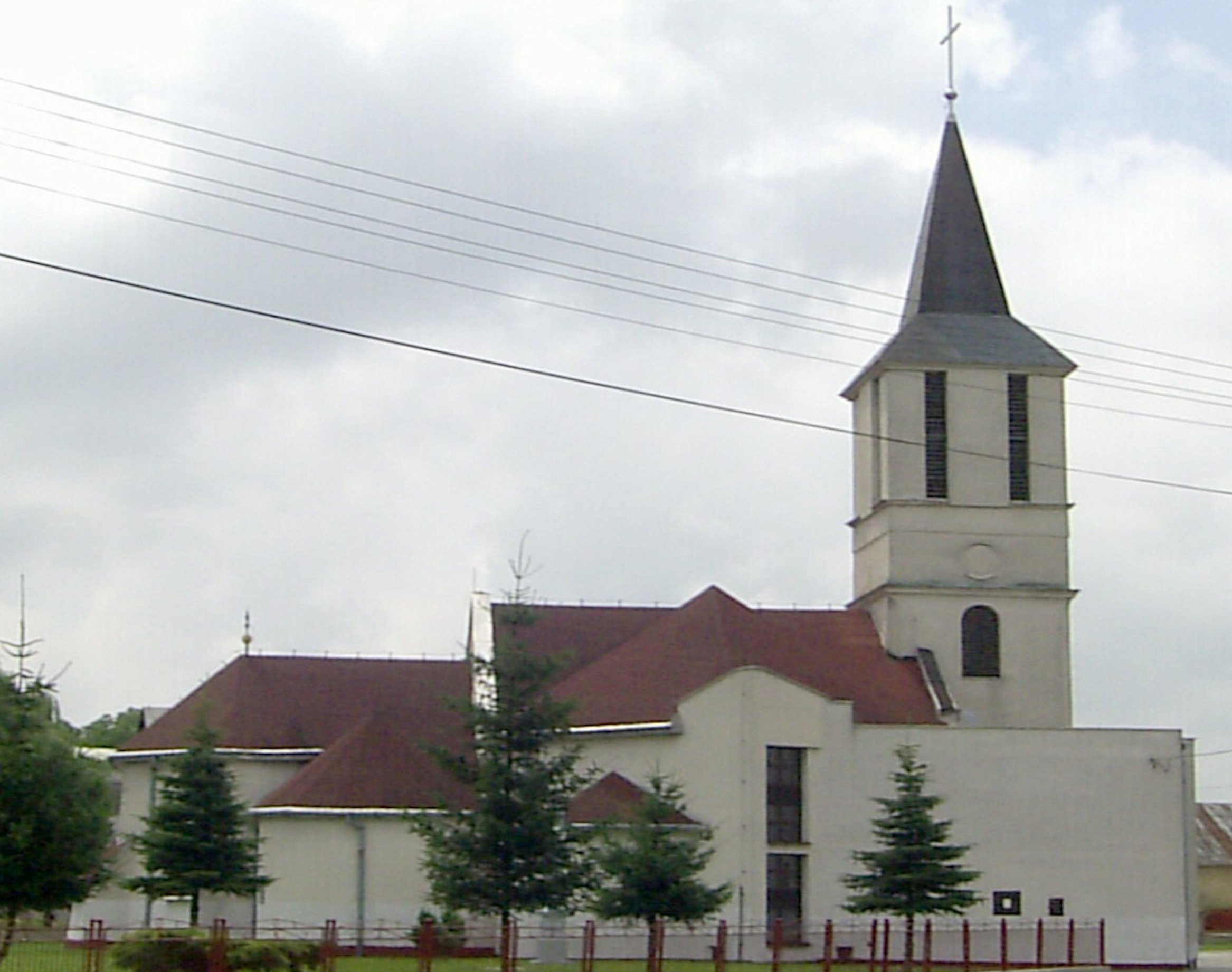 Rímsko-katolícka kostol Všetkých svätých v Nacina Ves